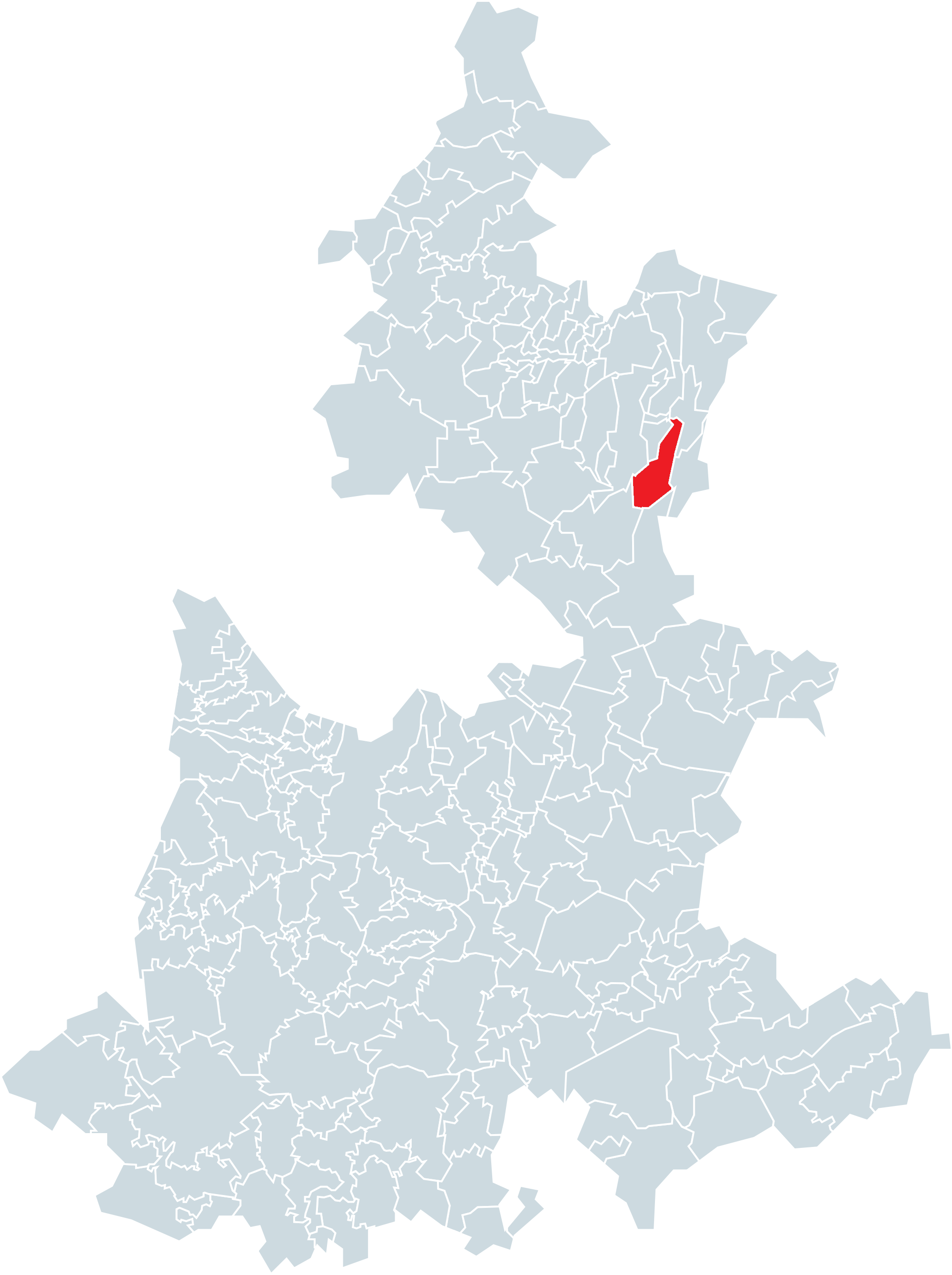 Municipio de Chignautla